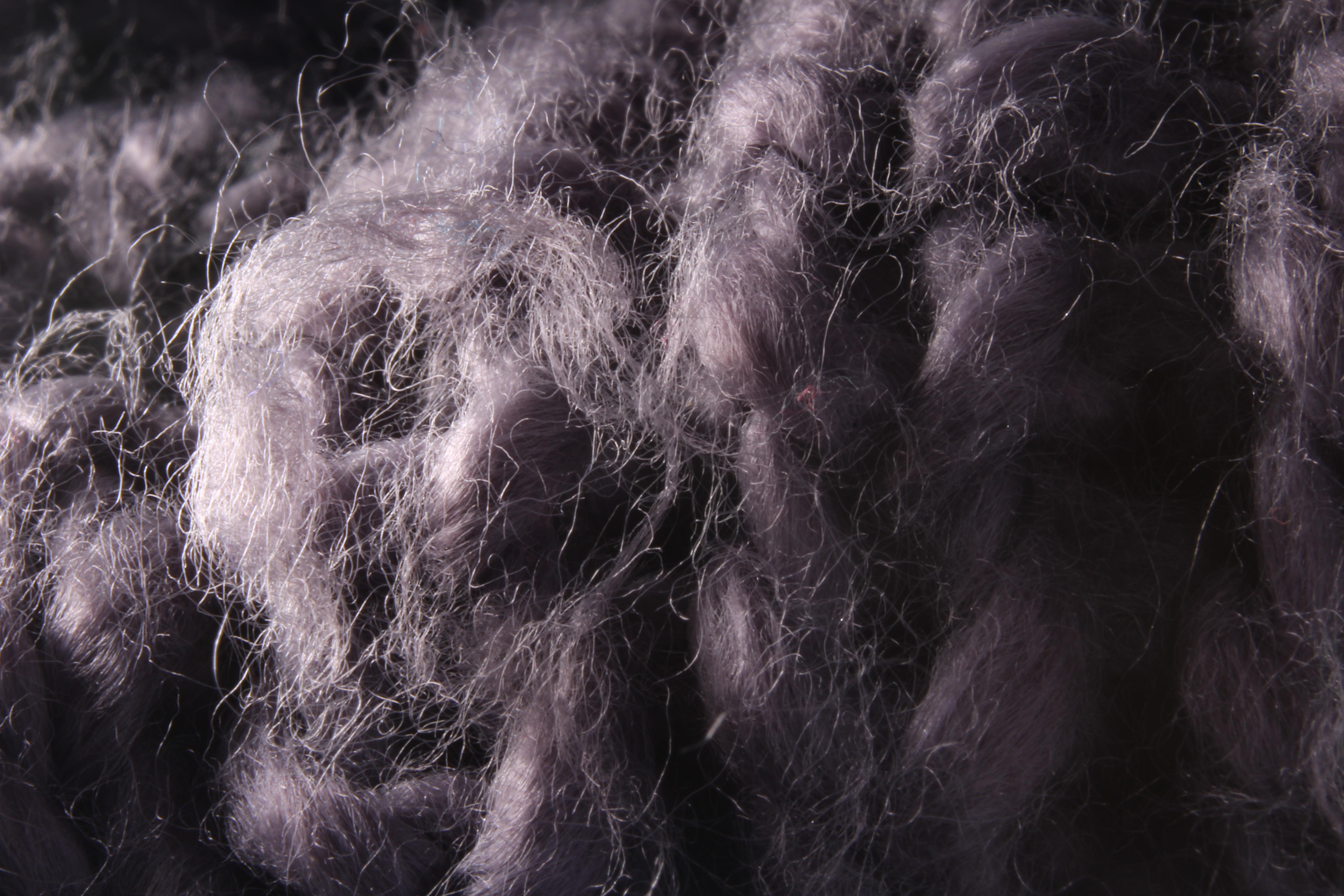 צמר בצבע סגול שצולם בעדשת מאקרו המדגישה את הסיבים הפנימיים .שאינם נראים לעין